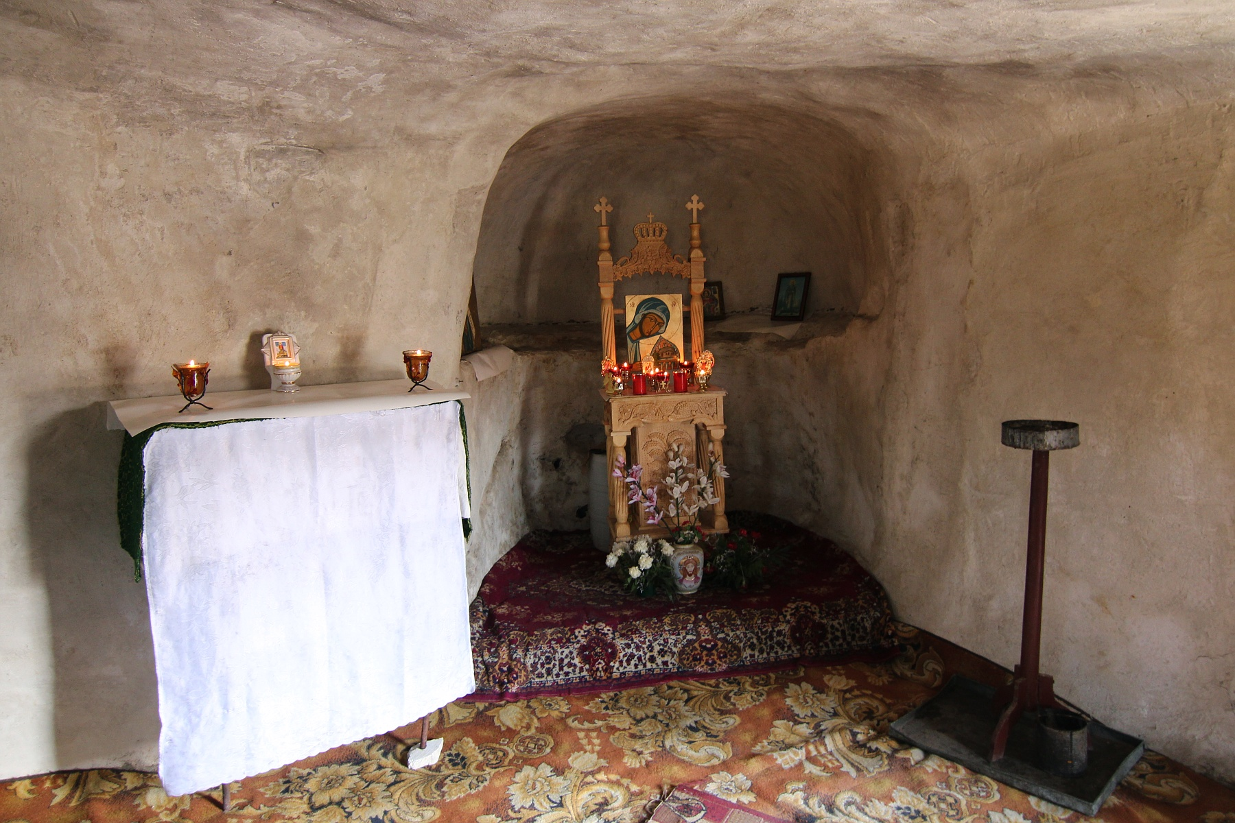 Biserică rupestră la schitul Negru Voda din Cetățeni 01